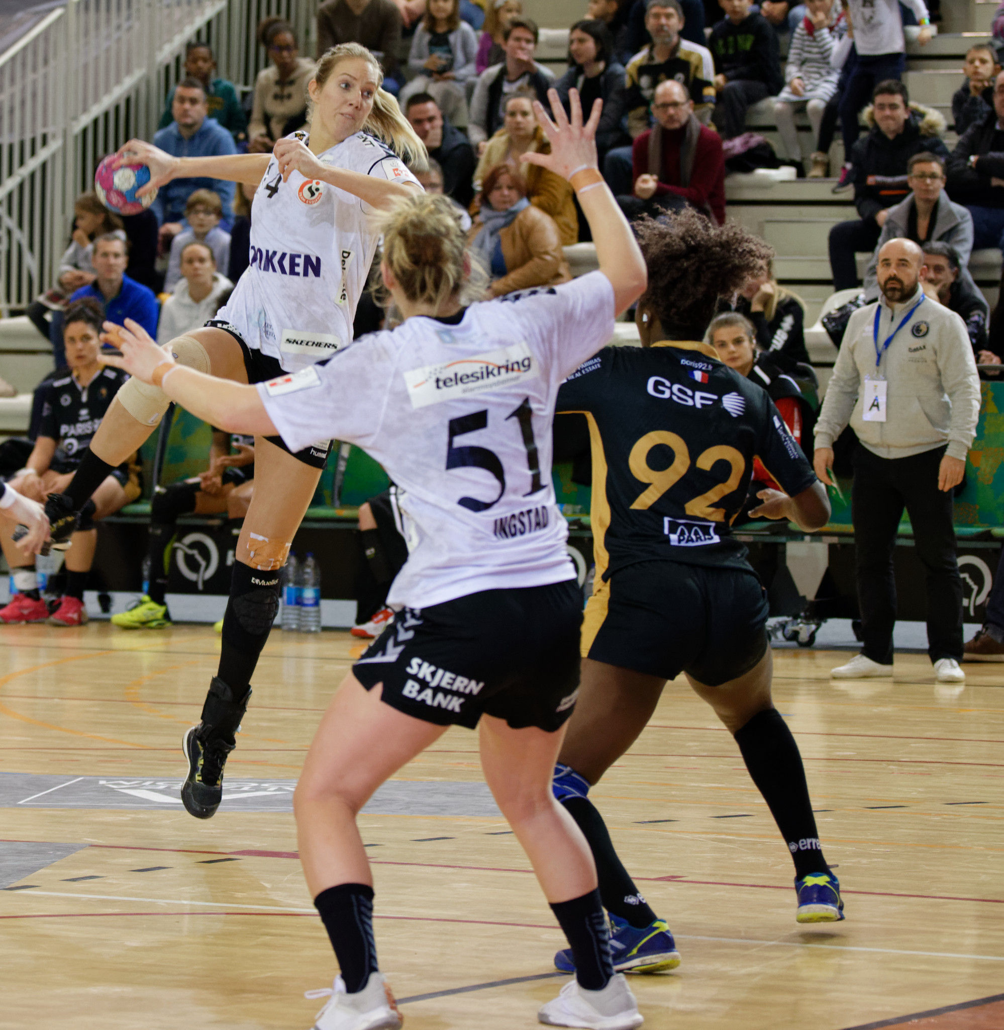 Lors de la rencontre du 3e tour de la Coupe EHF entre Paris 92 et les danoises de Team Esbjerg. A Issy les moulineaux, le 18 novembre 2018.